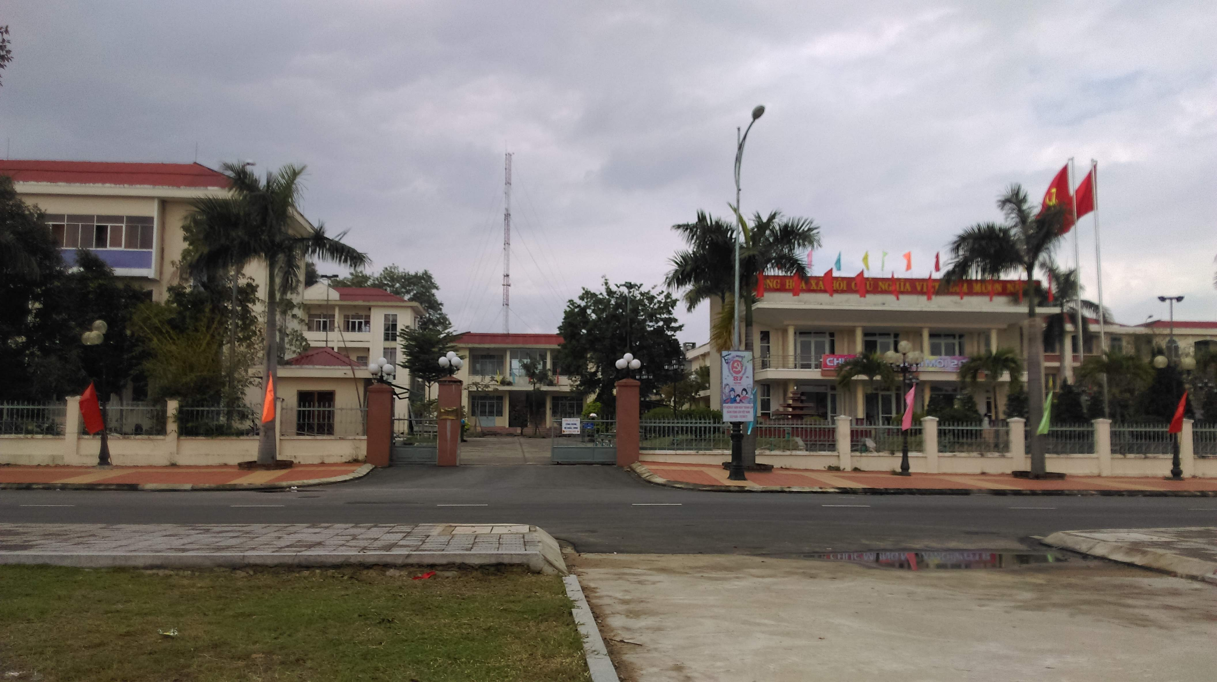 Giấy phép